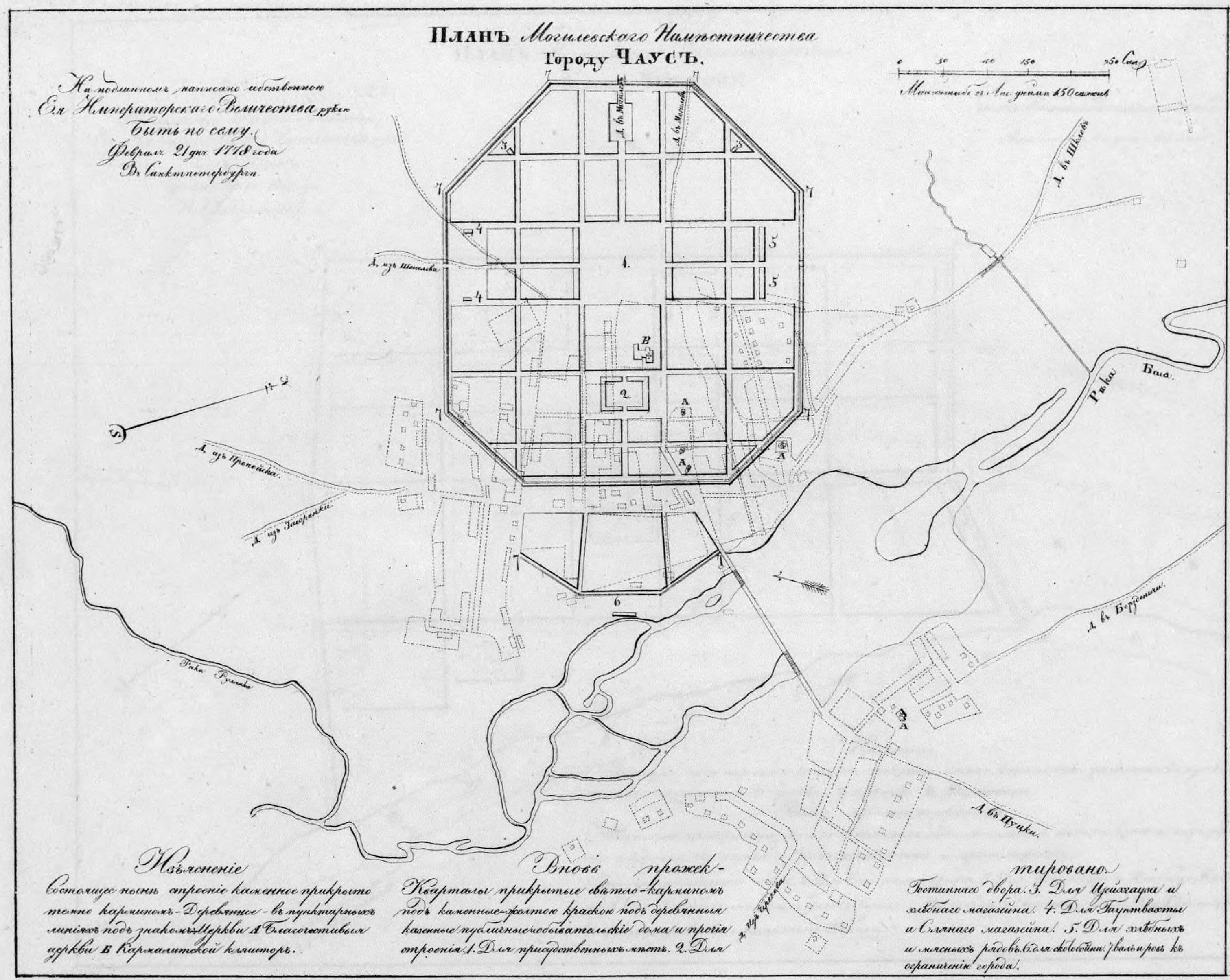 Полное Собрание Законов Российской Империи. Собрание первое. Книга чертежей и рисунков. (Планы городов).; 1839, Санктпетербургъ, Въ Типографіи II Отделенія Собственной Е. И. В. Канцеляріи.